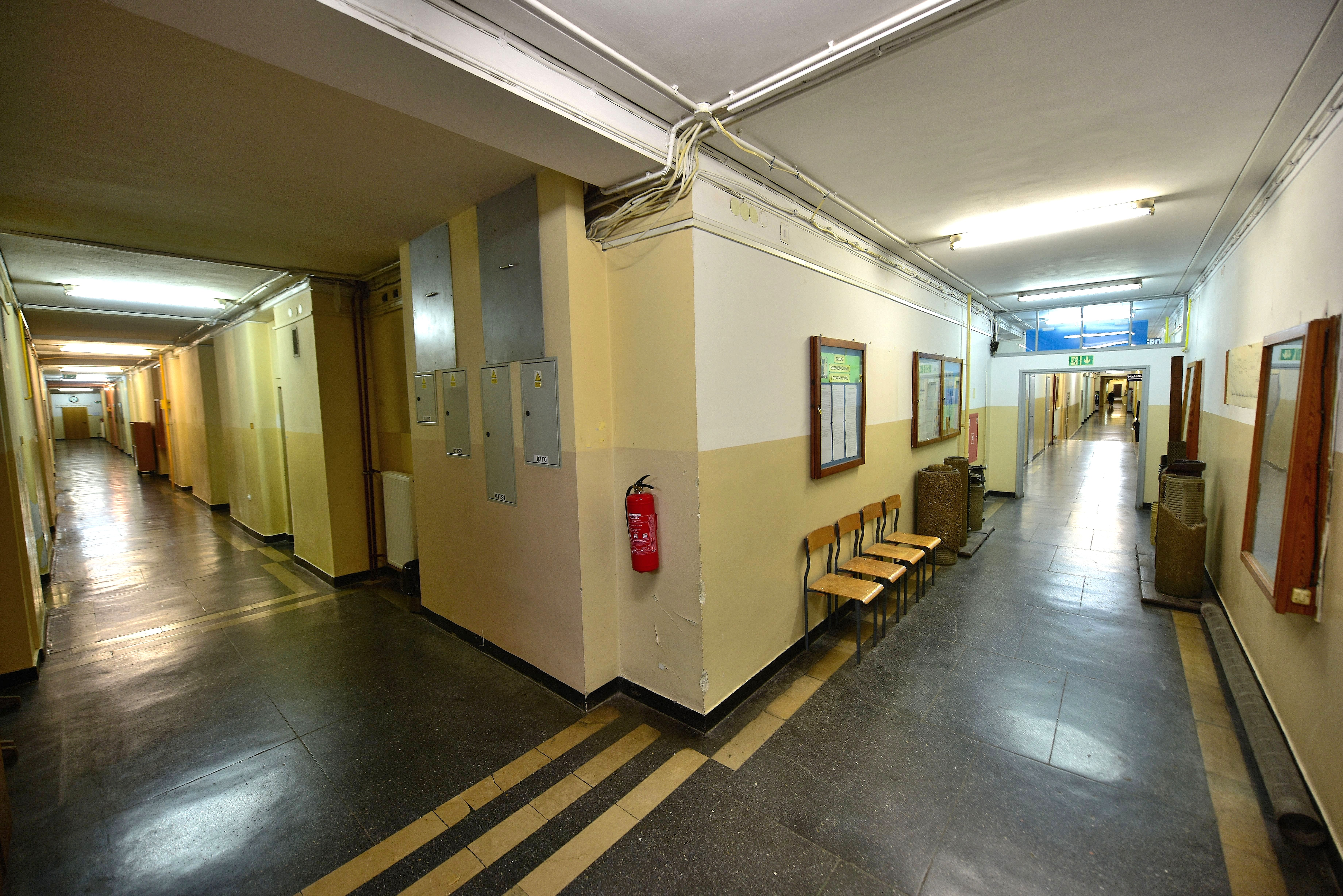 Wydział Geologii Uniwersytetu Warszawskiego. Korytarz na parterze budynku przy ul. Żwirki i Wigury 93 w Warszawie